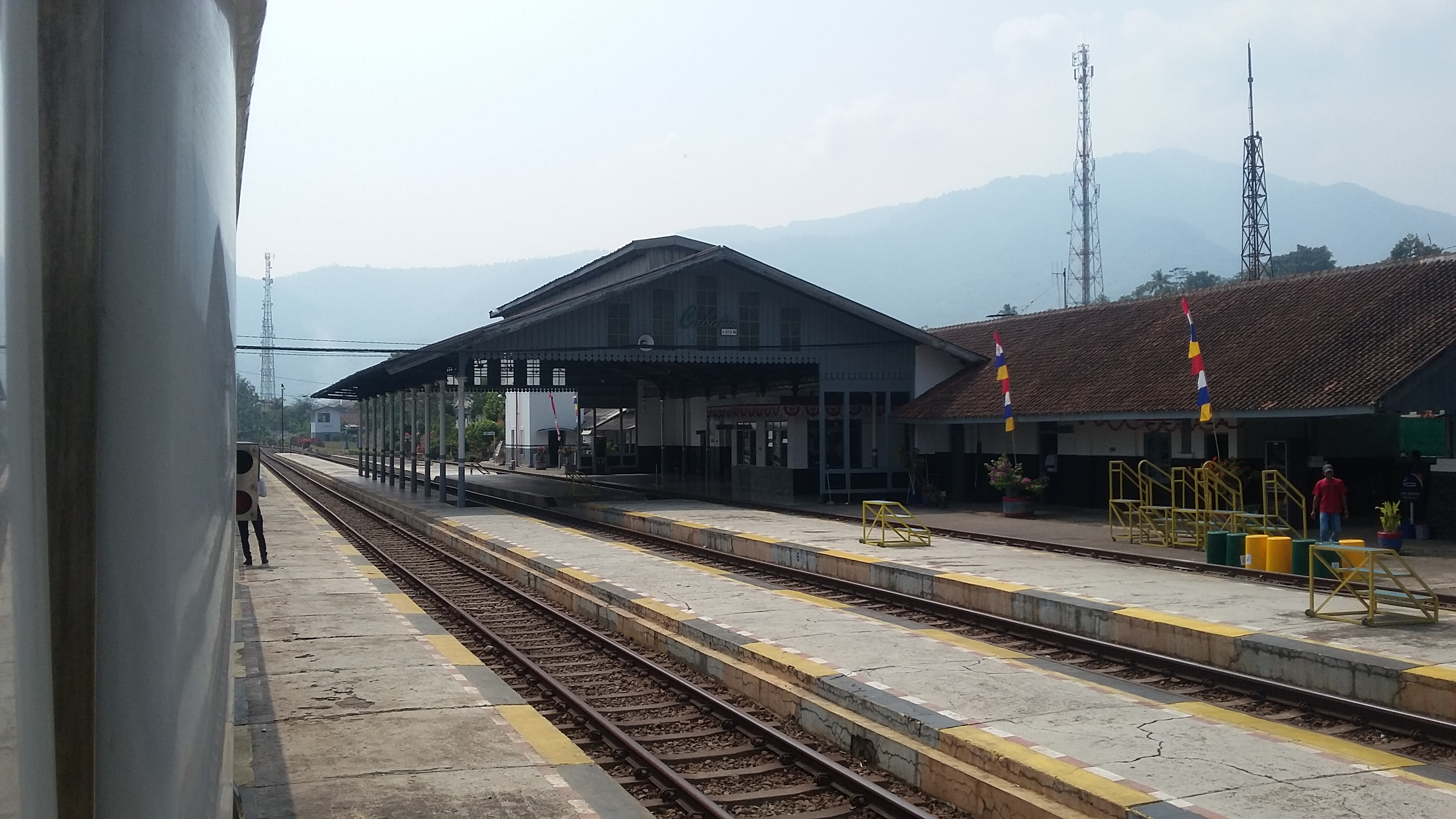 Stasiun Cibatu